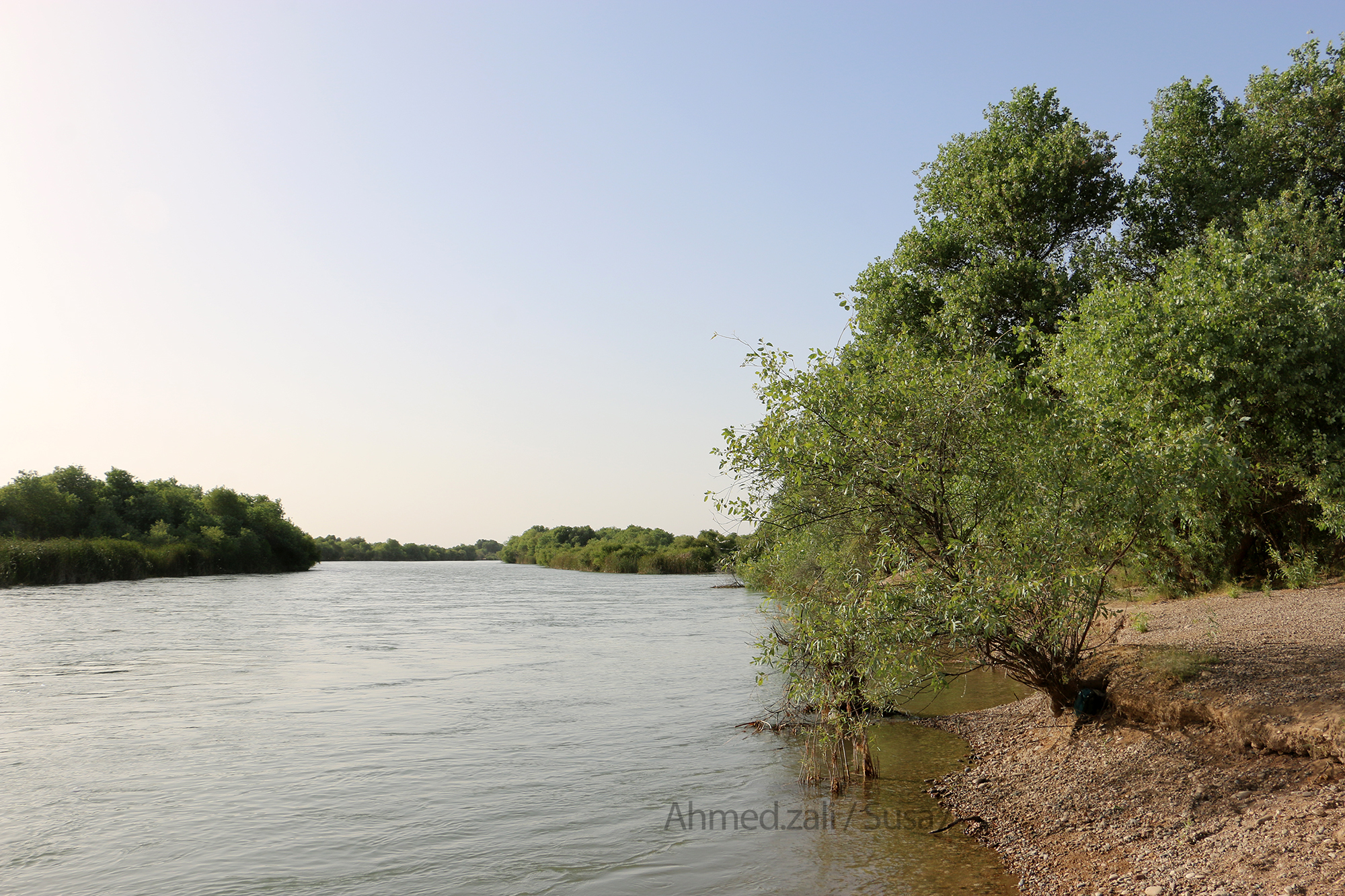 رود کرخه - چشم انداز زیبای جنگل قلعه نصیر